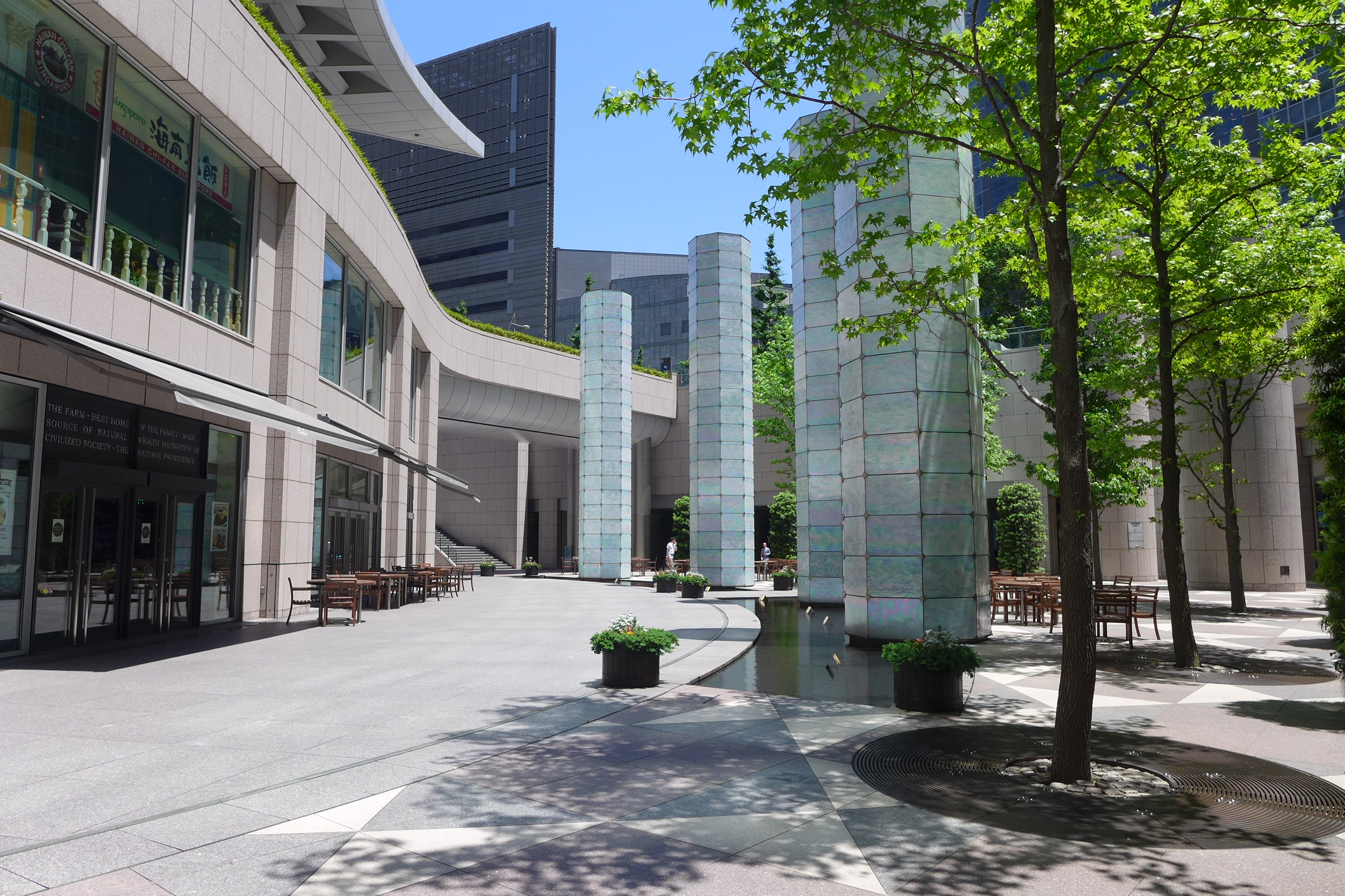 汐留シティセンター Shiodome City Center